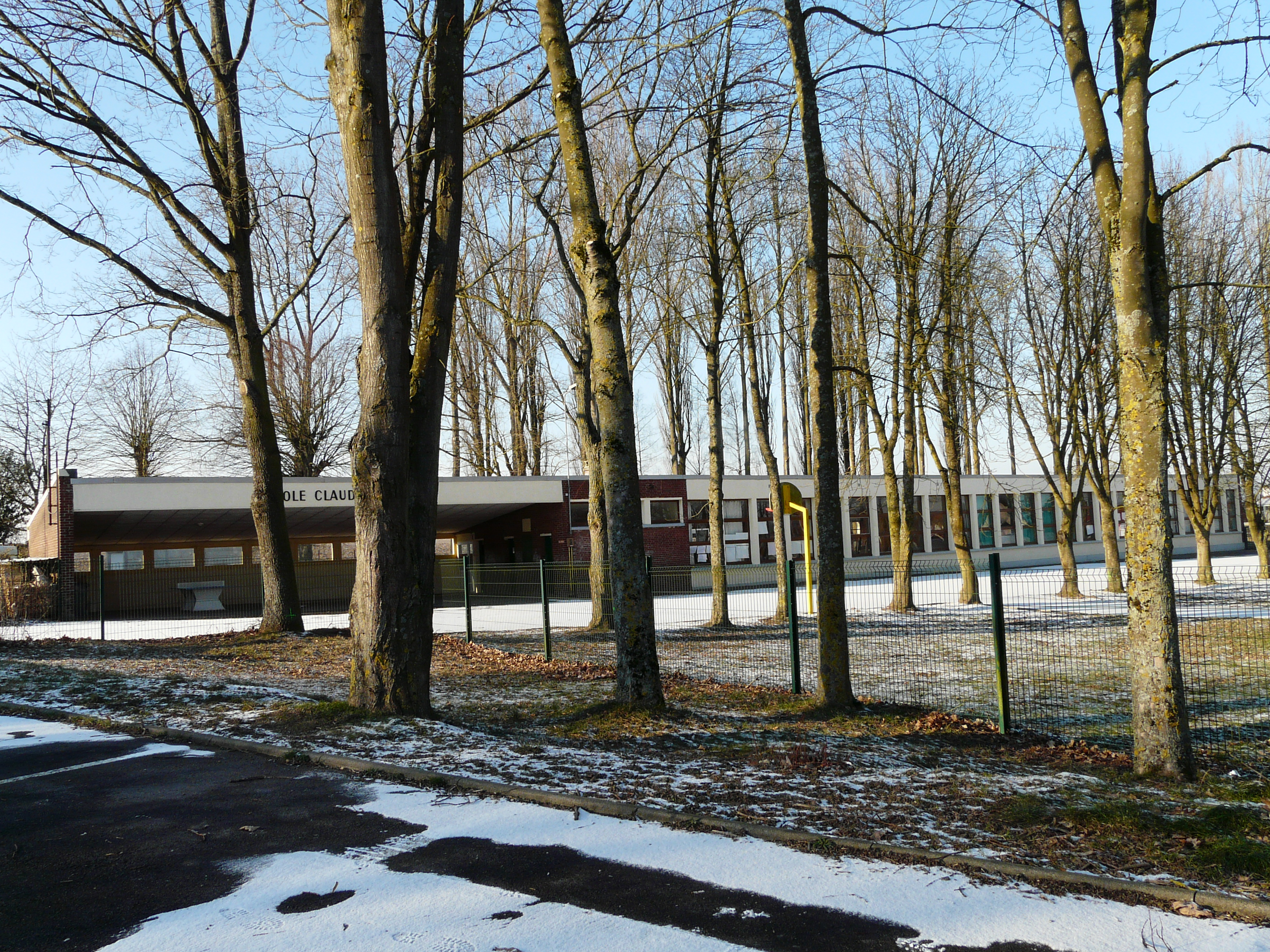 L'école primaire Claude-Bernard à Busigny (Nord)